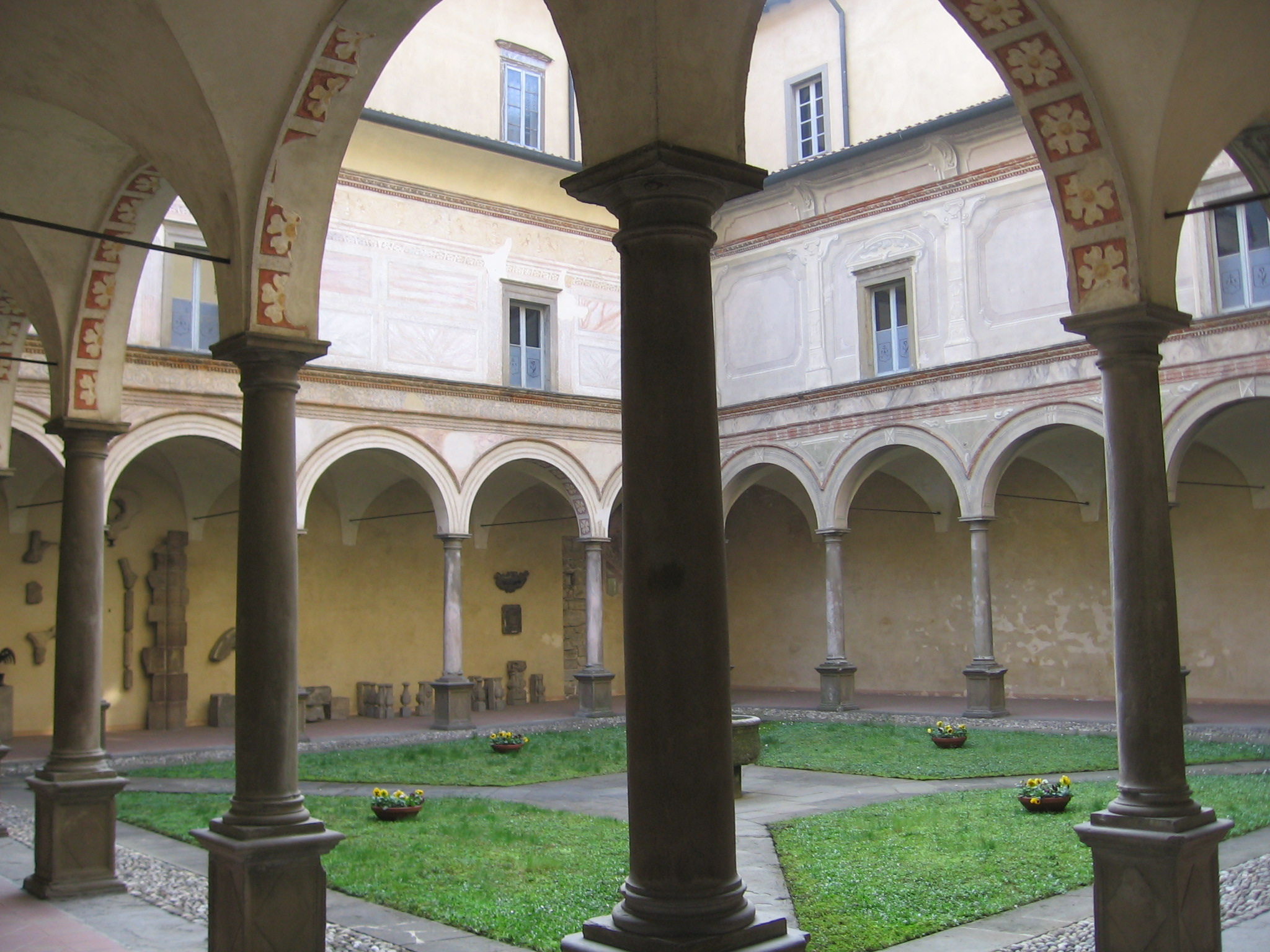 Pontida, Bergamo, Italia